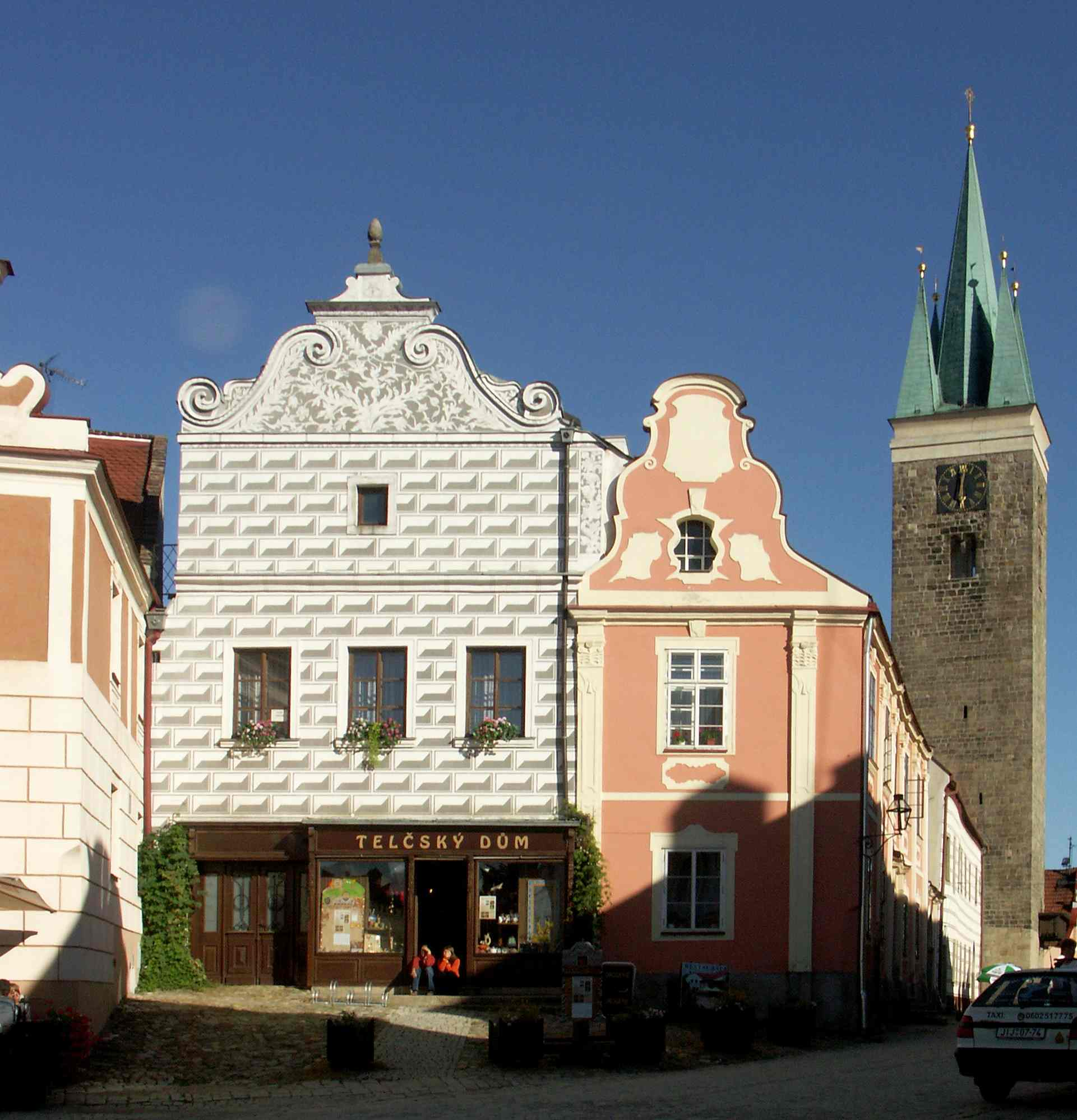 Telčský dům